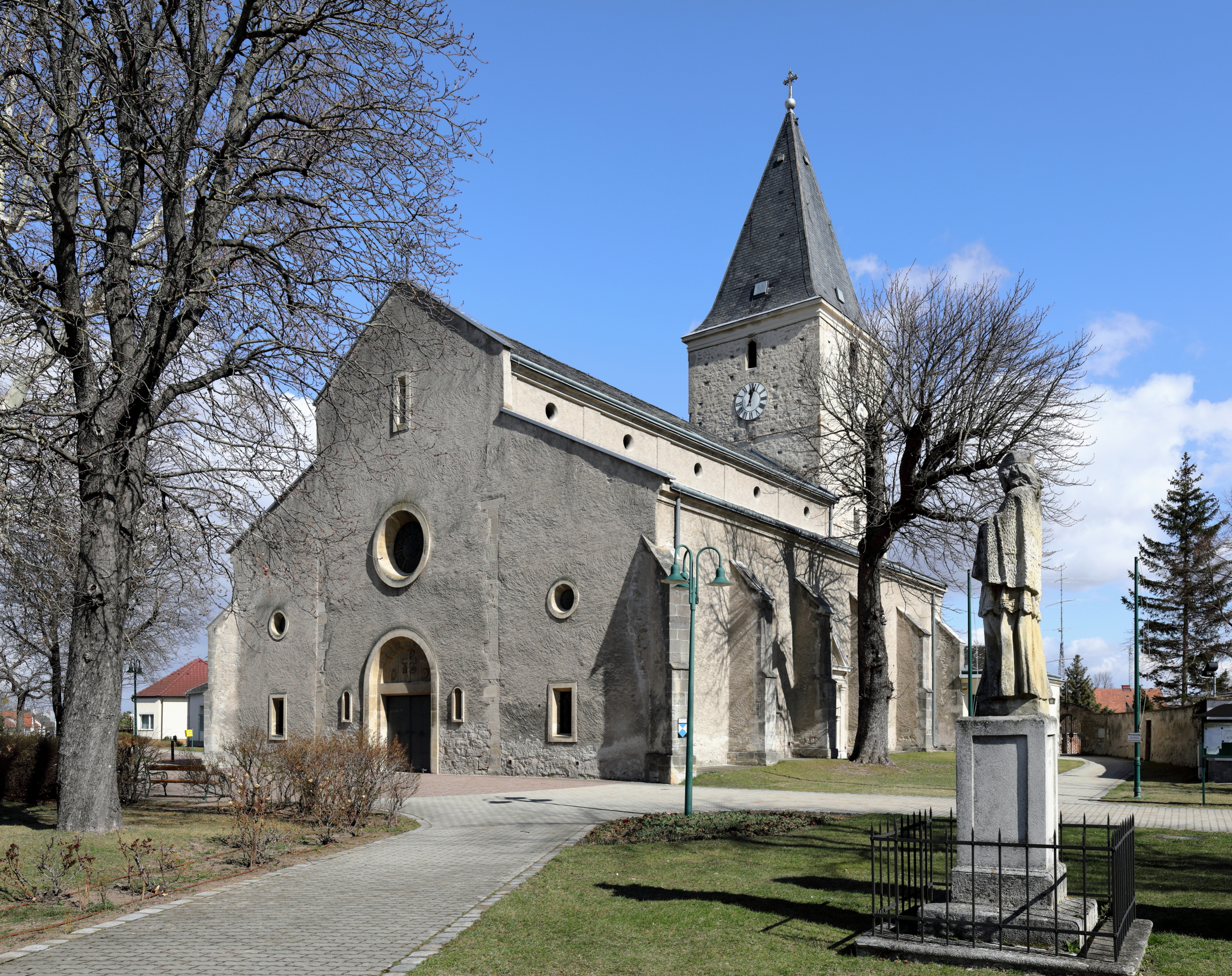 Südwestansicht der röm.-kath. Pfarrkirche hl. Laurentius in der niederösterreichischen Marktgemeinde Sollenau und rechts im Vordergrund eine barocke Nepomukstatue aus dem Jahr 1732.Die Kirche wurde ursprünglich im 12. Jahrhundert in Form einer niedrigen, dreischiffigen Basilika errichtet und Ende des 15. Jahrhunderts zu einer Staffelkirche umgebaut. Der Kirchturm wurde ab der Mitte des 13. Jahrhunderts im Osten angebaut und im 14. Jahrhundert um ein Wehrgeschoß sowie im 15. Jahrhundert um ein Glockengeschoß erhöht.